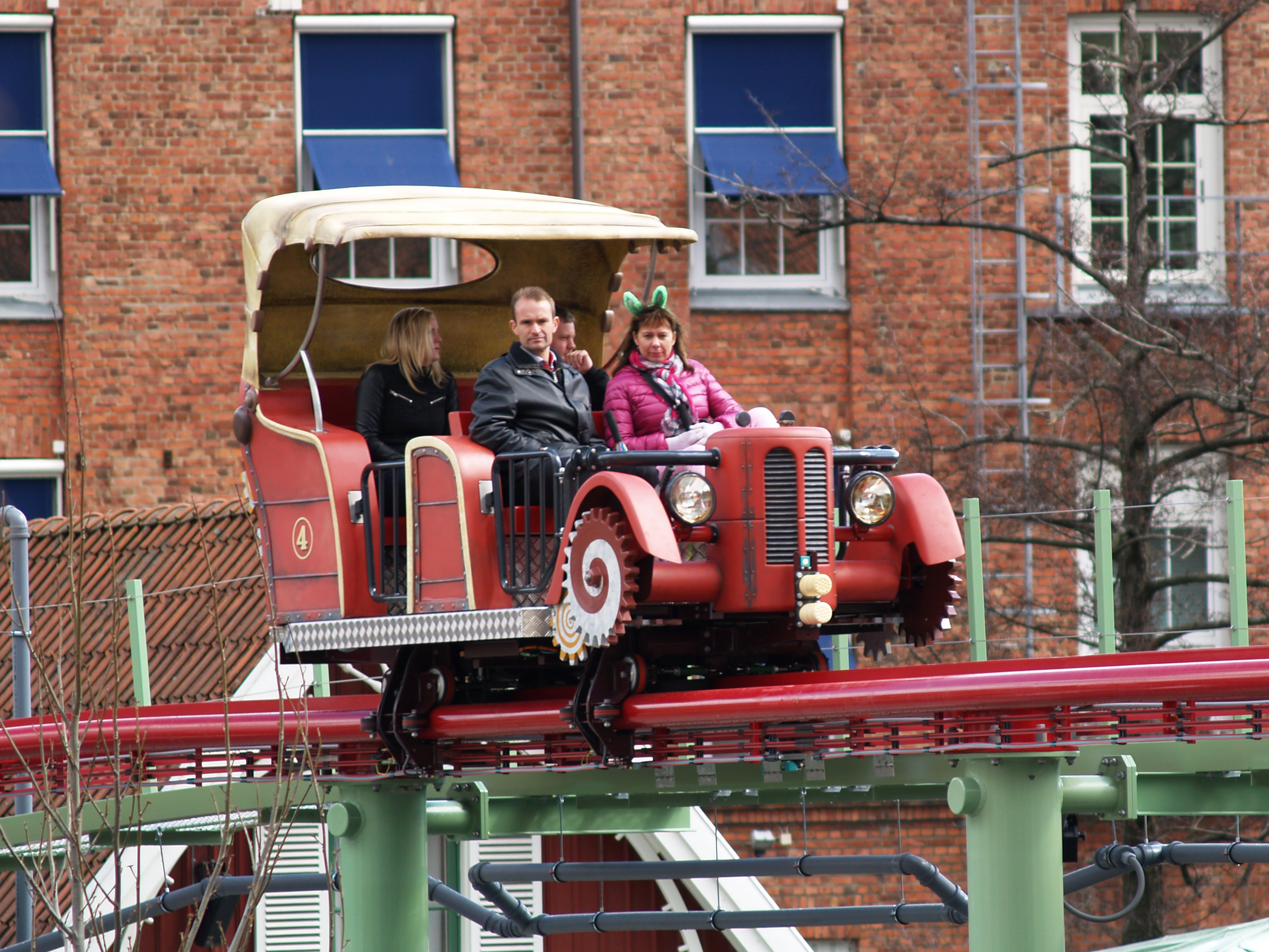 Åkattraktionen Kaninlandsbanan i nöjesparken Liseberg i Göteborg.